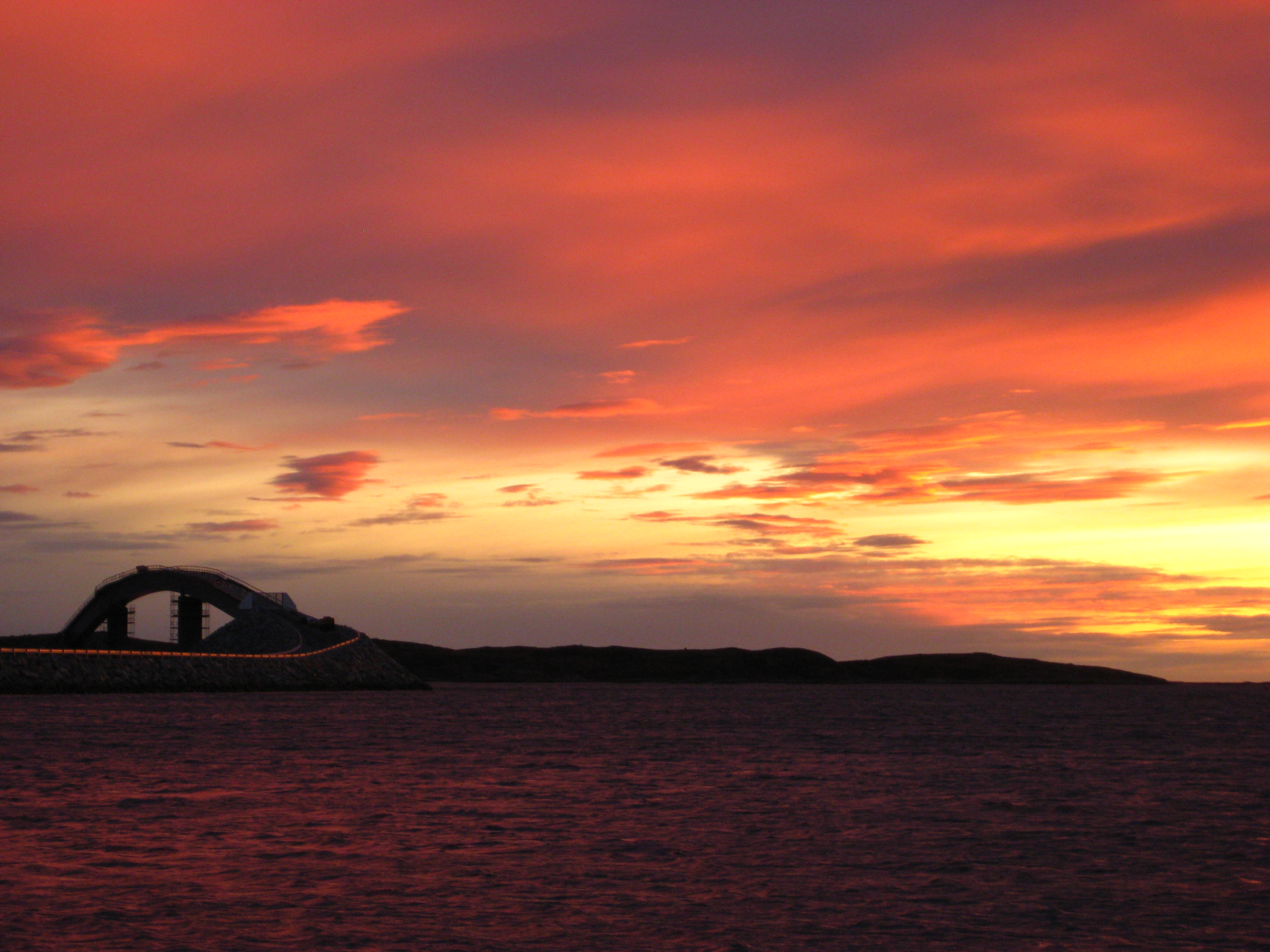 Stokkoya-Linesoya bridge